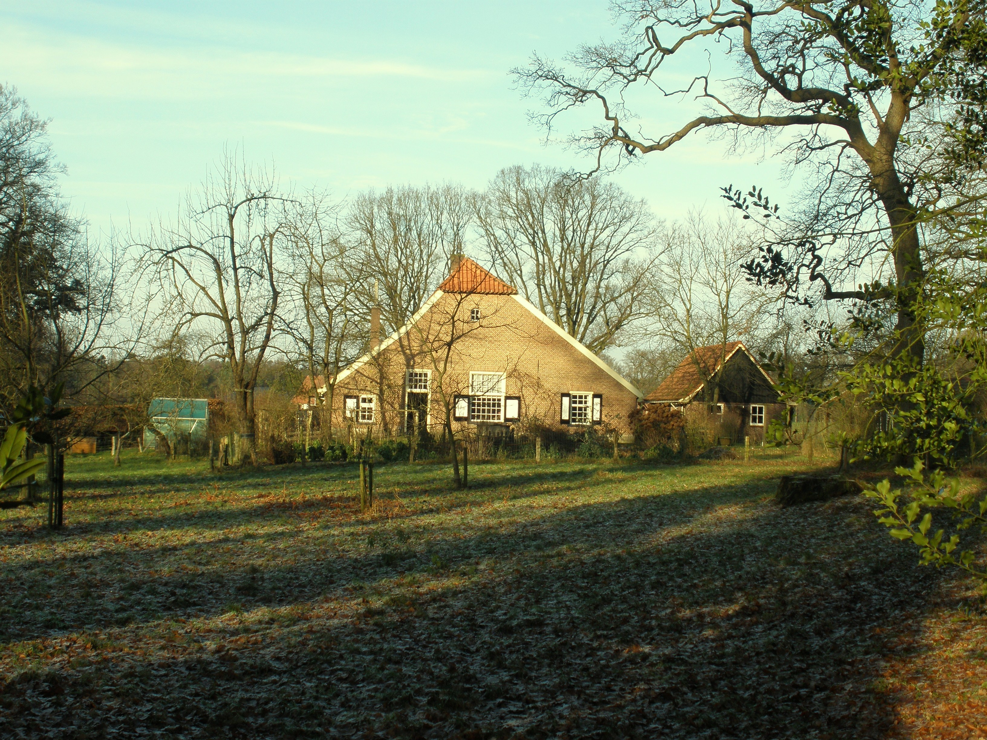 Boerderij Dubbelink erf in Azelo